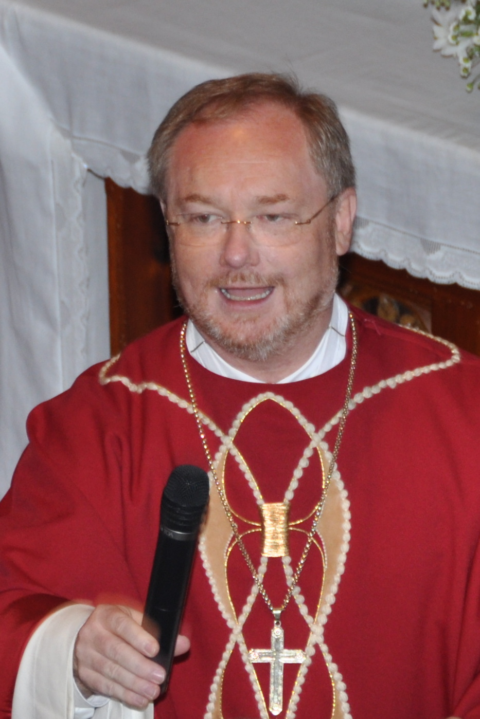 Severin Lederhilger spendet die heilige Firmung in St. Gotthard am 5. Juni 2011